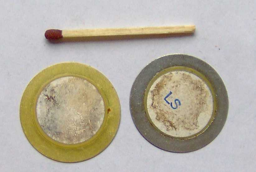 Electronic component - piezo elements